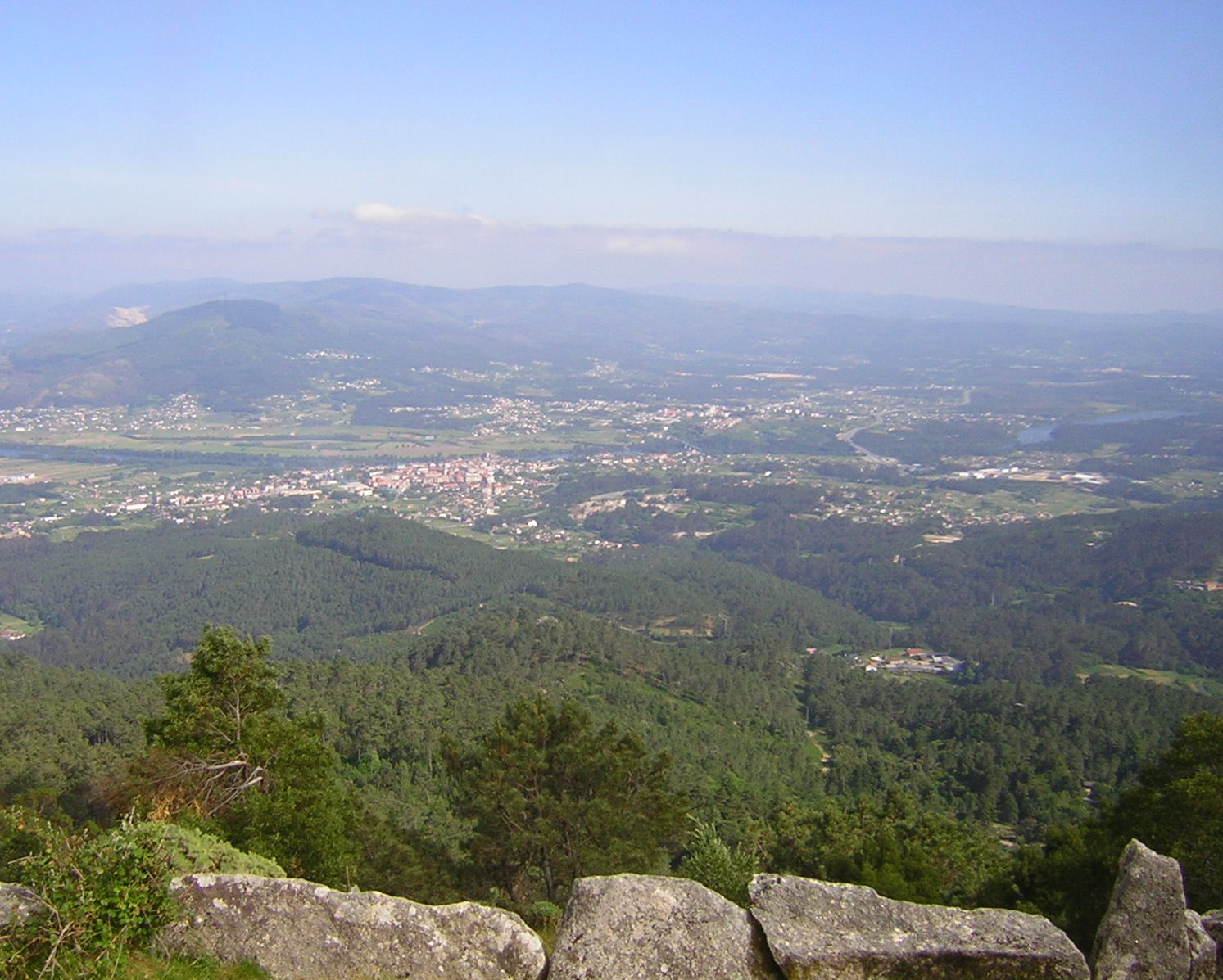 Fotografía tomada dende o Monte Aloia.